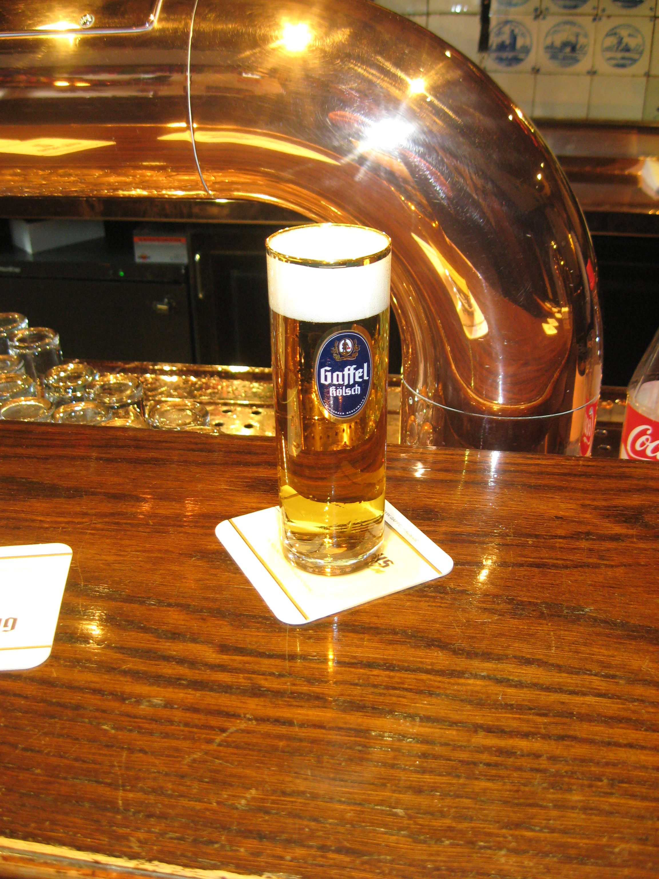 Brauhaus Gaffel, Kölsch, Köln, (Alter Markt) Datum: 02.03.2011 Urheber M. Pfeiffer alias Benutzer:Gordito1869 Quelle: privates Fotoarchiv des Urhebers